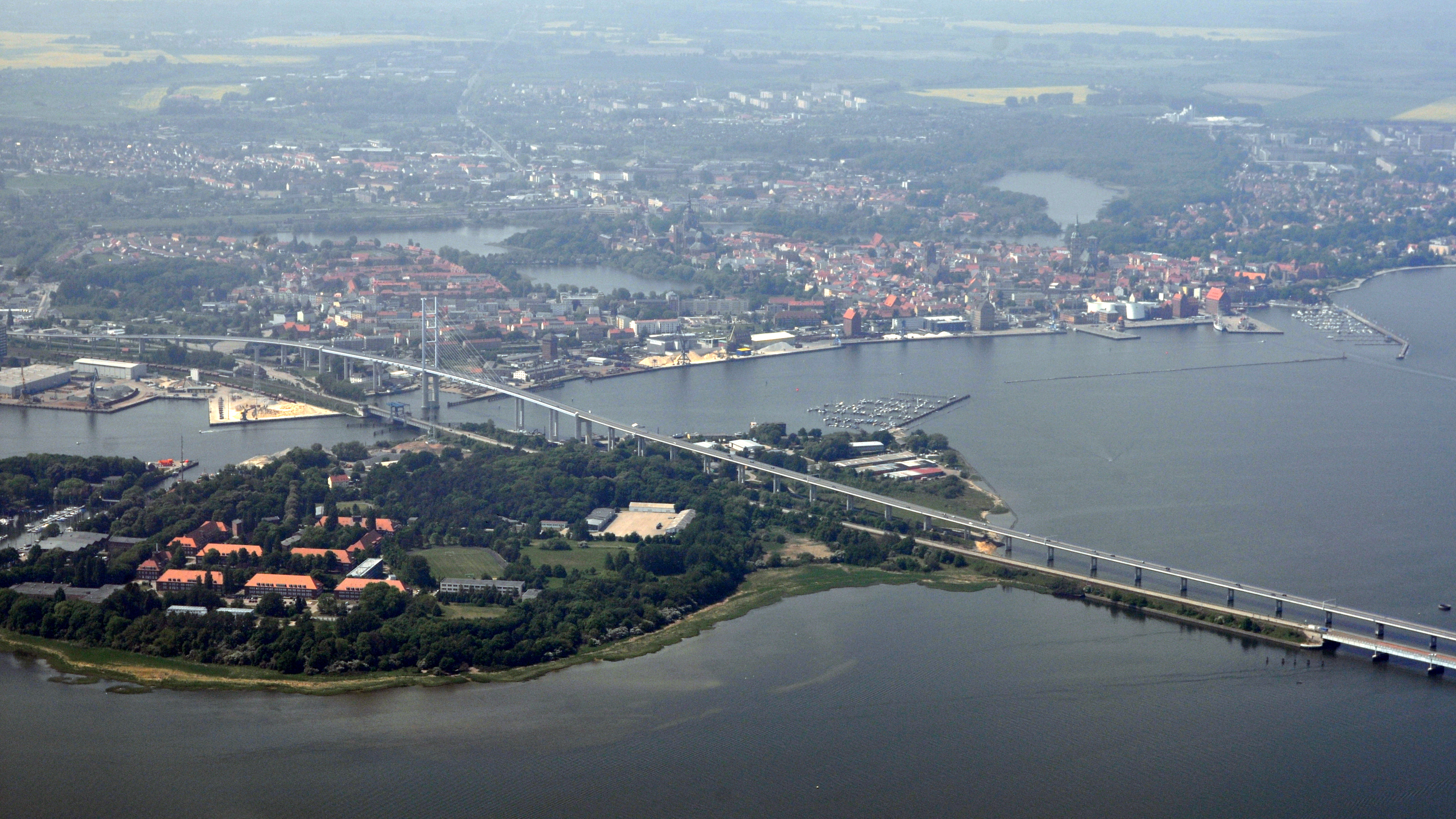 Die Bilder wurden von mir während eines einstündigen Rundflugs ab Flugplatz Güttin am 21. Mai 2011 aufgenommen. Die Bildbeschreibung steht im Dateinamen. Aufgenommen mit einer Nikon D5000 durch das Seitenfenster des Flugzeugs.